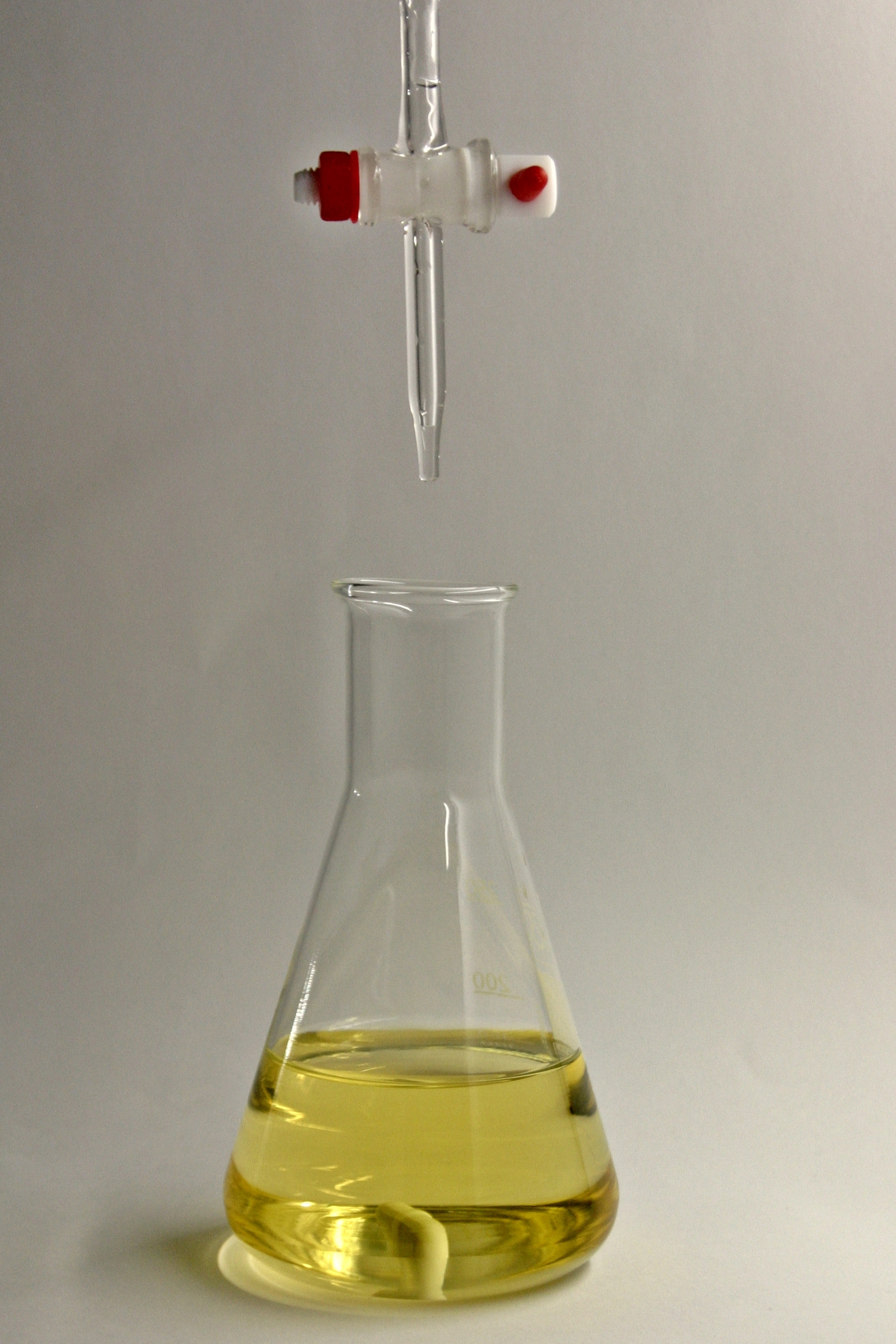 Titracija - u erlenmajeru se nalazi NaOH i indikator (metil-oranž).Prilikom ukapavanja HCl menja se boja.